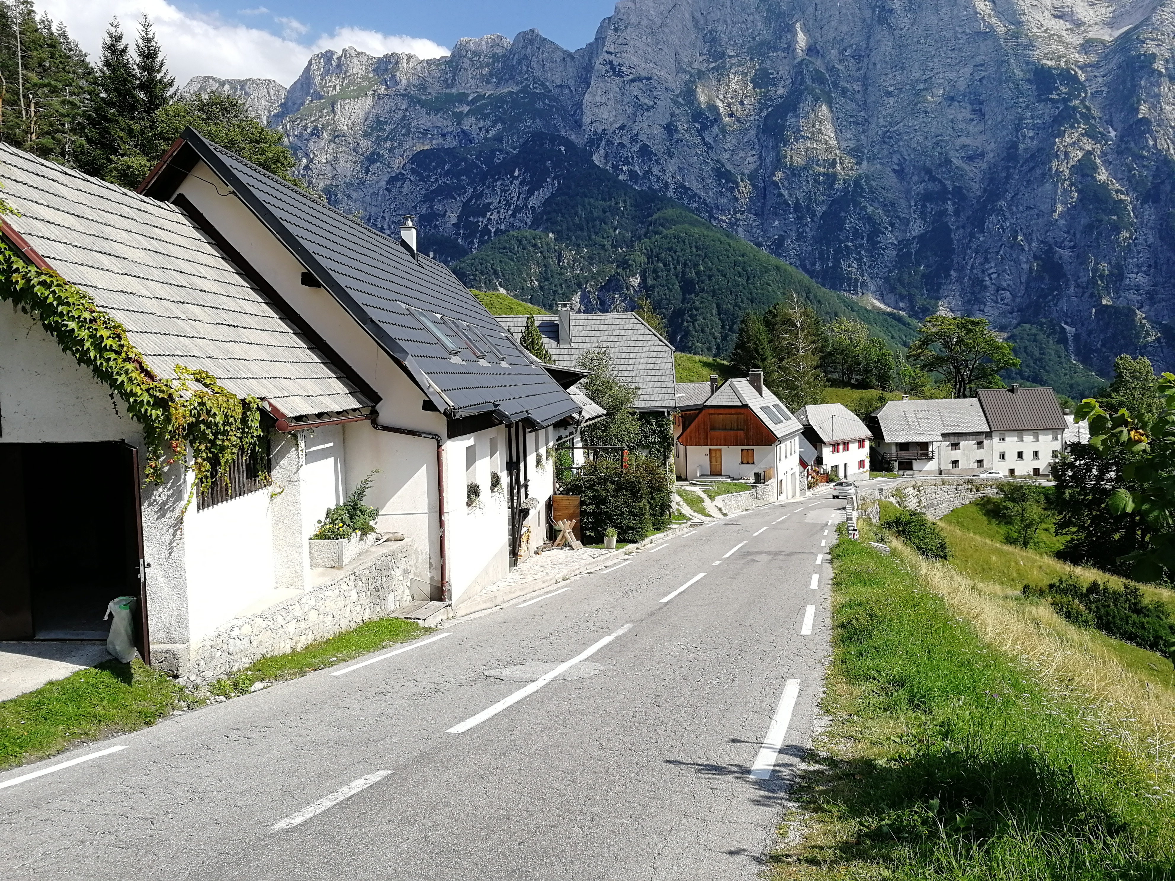 Bretto di Sopra come si presenta al giorno d'oggi